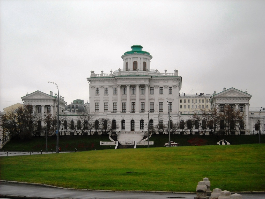 Дом Пашкова, Москва)